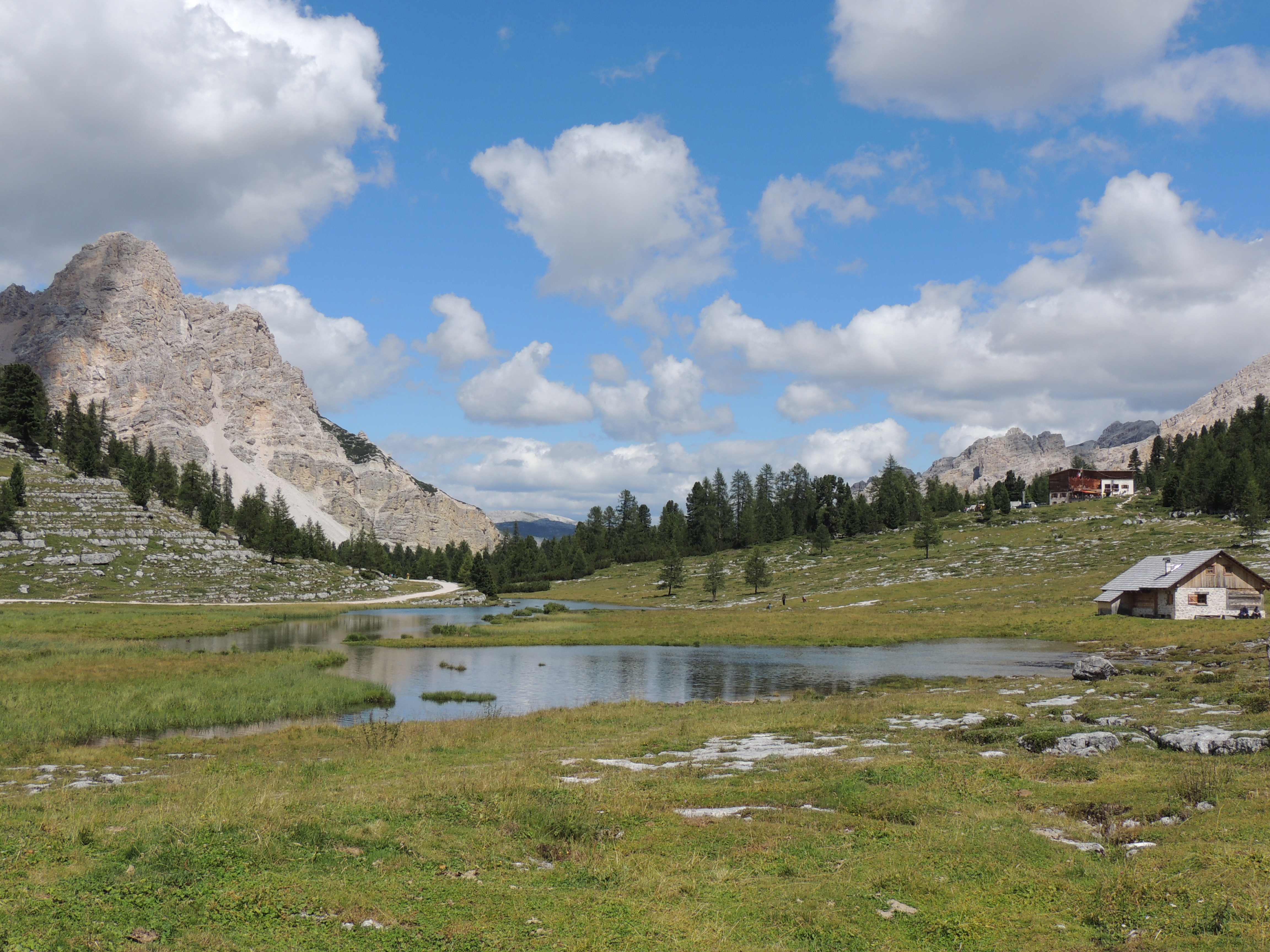 Parco naturale Fanes - Sennes - Braies (Q740279)